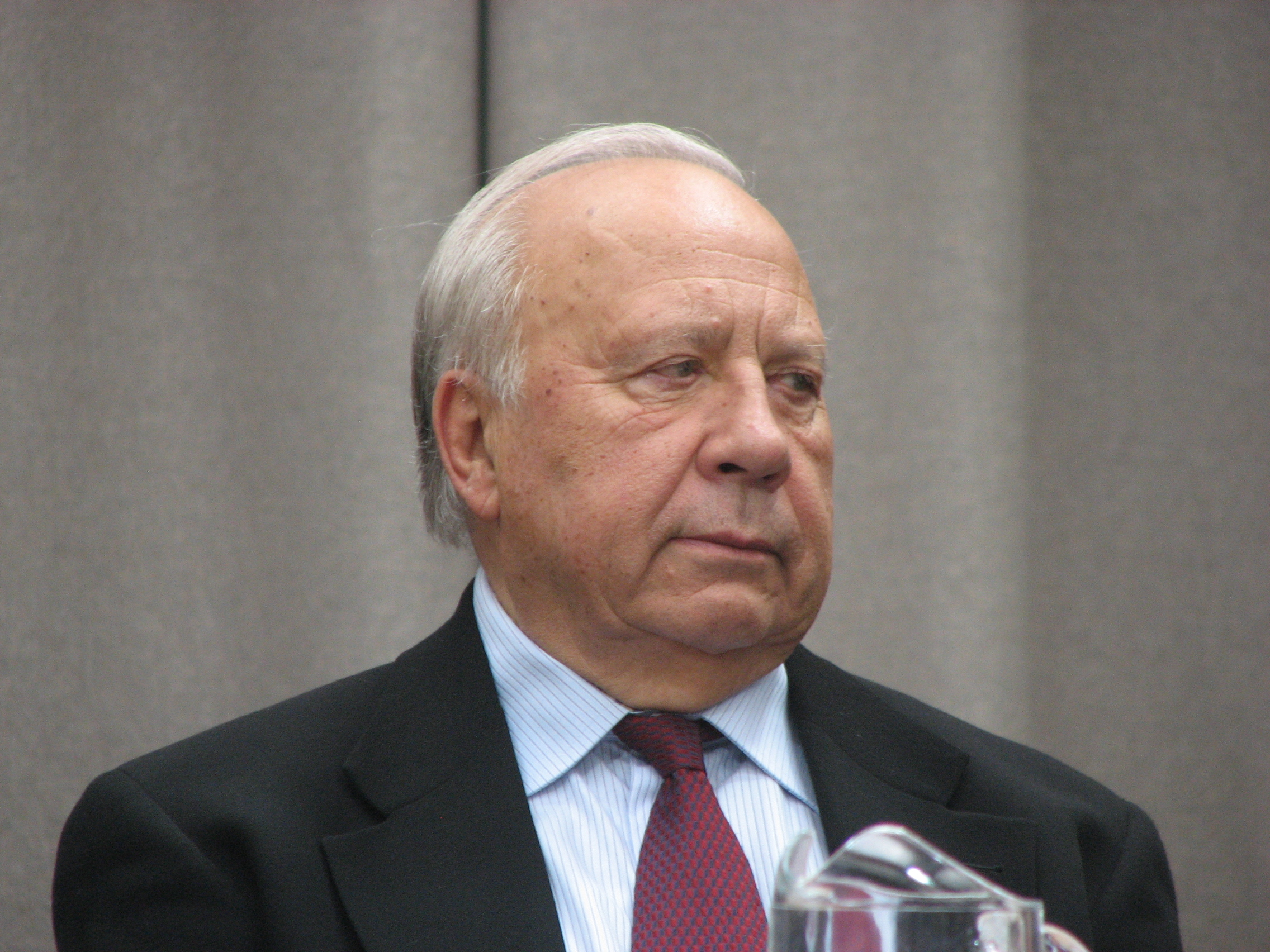 Neeme Järvi Estonia maja 100. aastapäeva puhul korraldatud autogrammitunnis Estonia talveaias